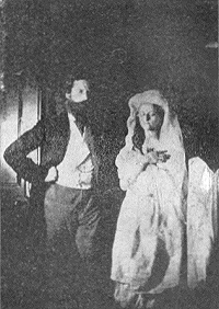 Katie King et William Crookes pris en photo par William Crookes pour ses «Notes of an Enquiry into the Phenomena called Spiritual during the Years 1870-1873.», Quarterly Journal of Science., janvier 1874.